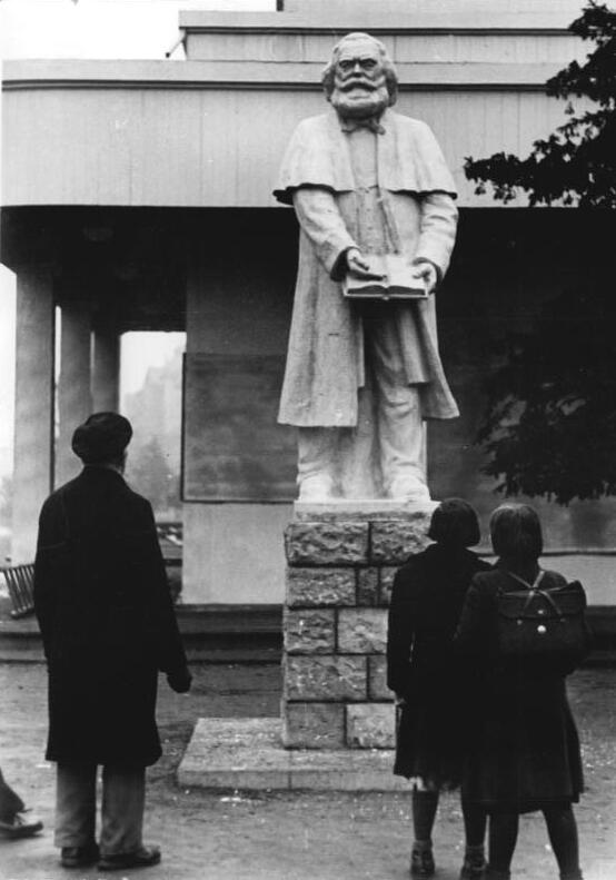 Dresden, Karl-Marx-Denkmal Zentralbild Höhne-Pohl 18.3.1953 Karl-Marx-Jahr 1953 Zum 70. Todestag von Karl Marx, des genialen Begründers des wissenschaftlichen Sozialismus, wurde in Dresden auf dem Platz der Einheit dieses monumentale Standbild, das von Bildhauer Otto Rost geschaffen wurde, aufgestellt.